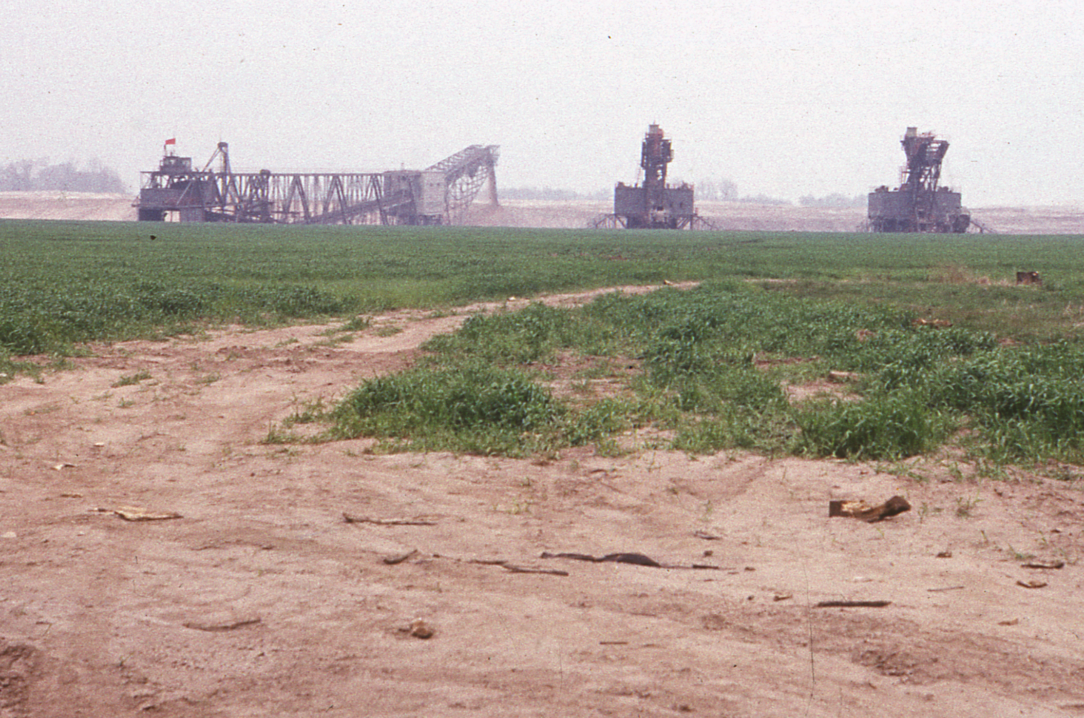 Gliechow 1978, Tagebau Schlabendorf-Süd, Förderbrücke (F34 Nr. 25 ODER Nr. 28) und zwei Eimerkettenbagger